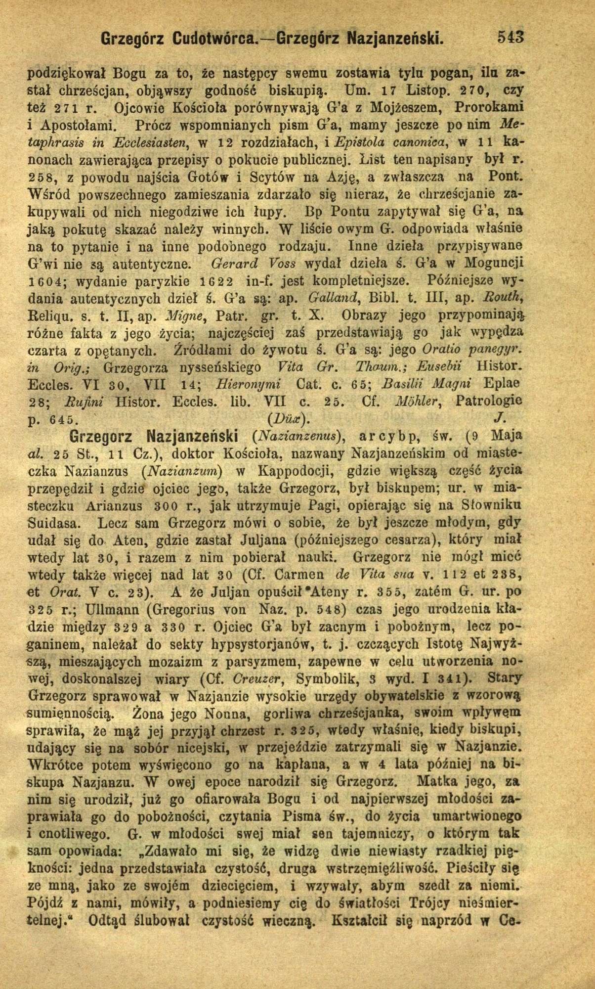 Encyklopedia składająca się z 33 tomów wydanych w latach 1873-1933.